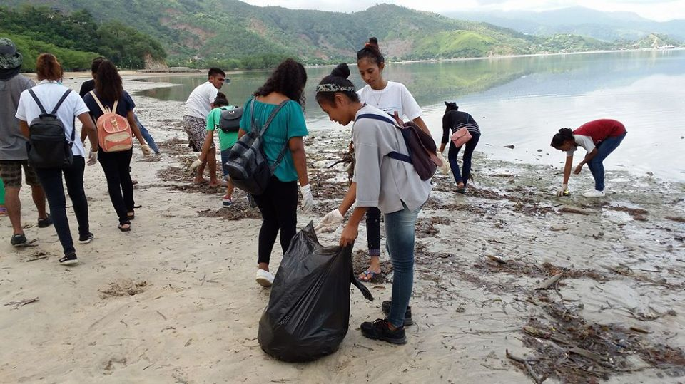 Müllsammelaktion durch Freiwillige am Strand von Areia Branca